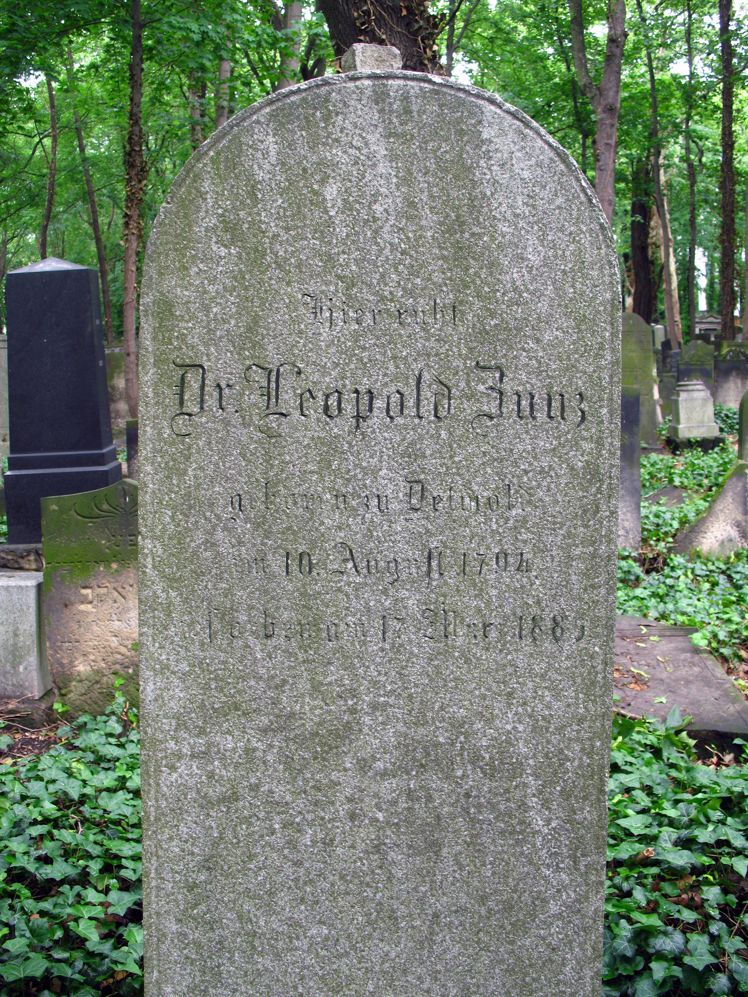 Alter Jüdischer Friedhof, Berlin-Prenzlauer Berg: Leopold Zunz